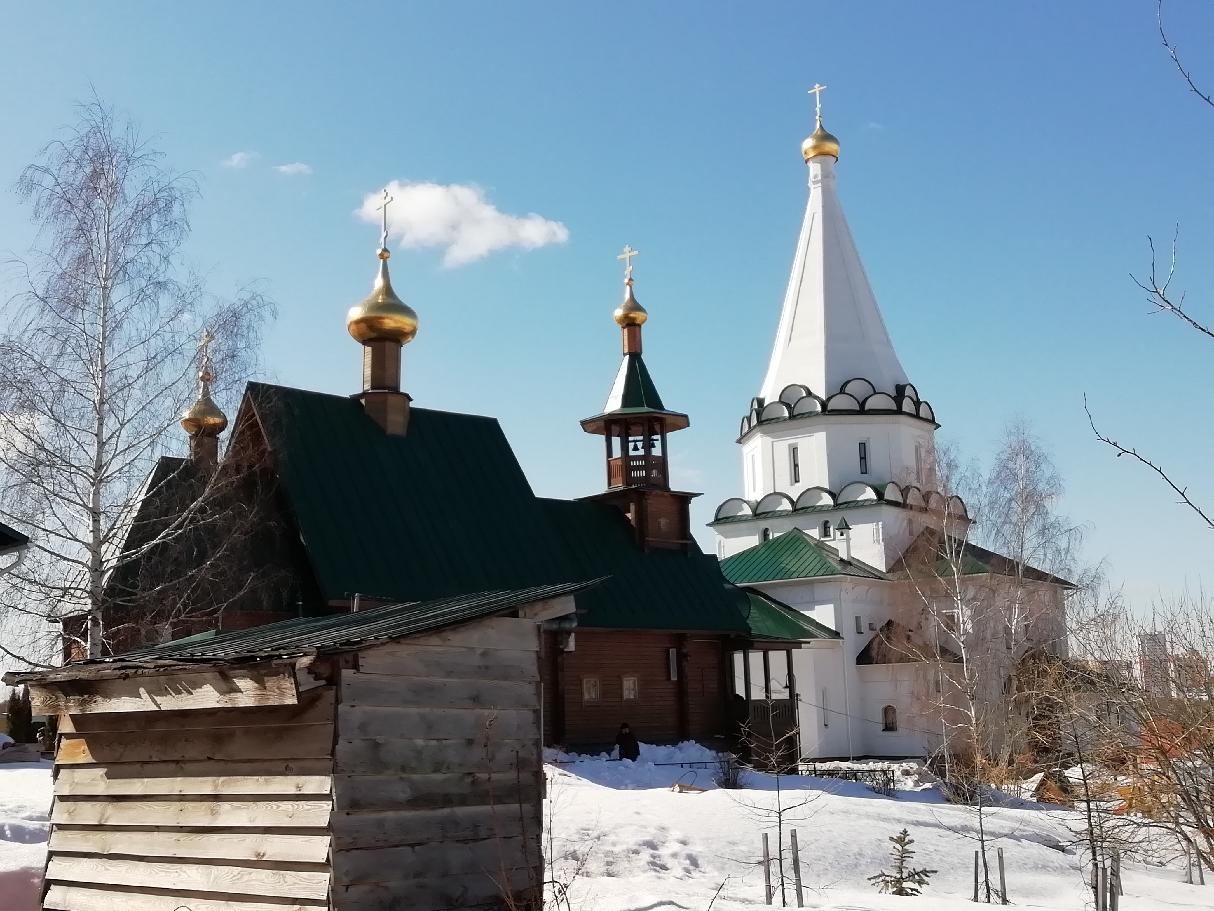 Церкви во имя святого князя Игоря Черниговского и равноапостольной княгини Ольги, Нижний Новгород, ул. Верхне-Печёрская, д. 8а